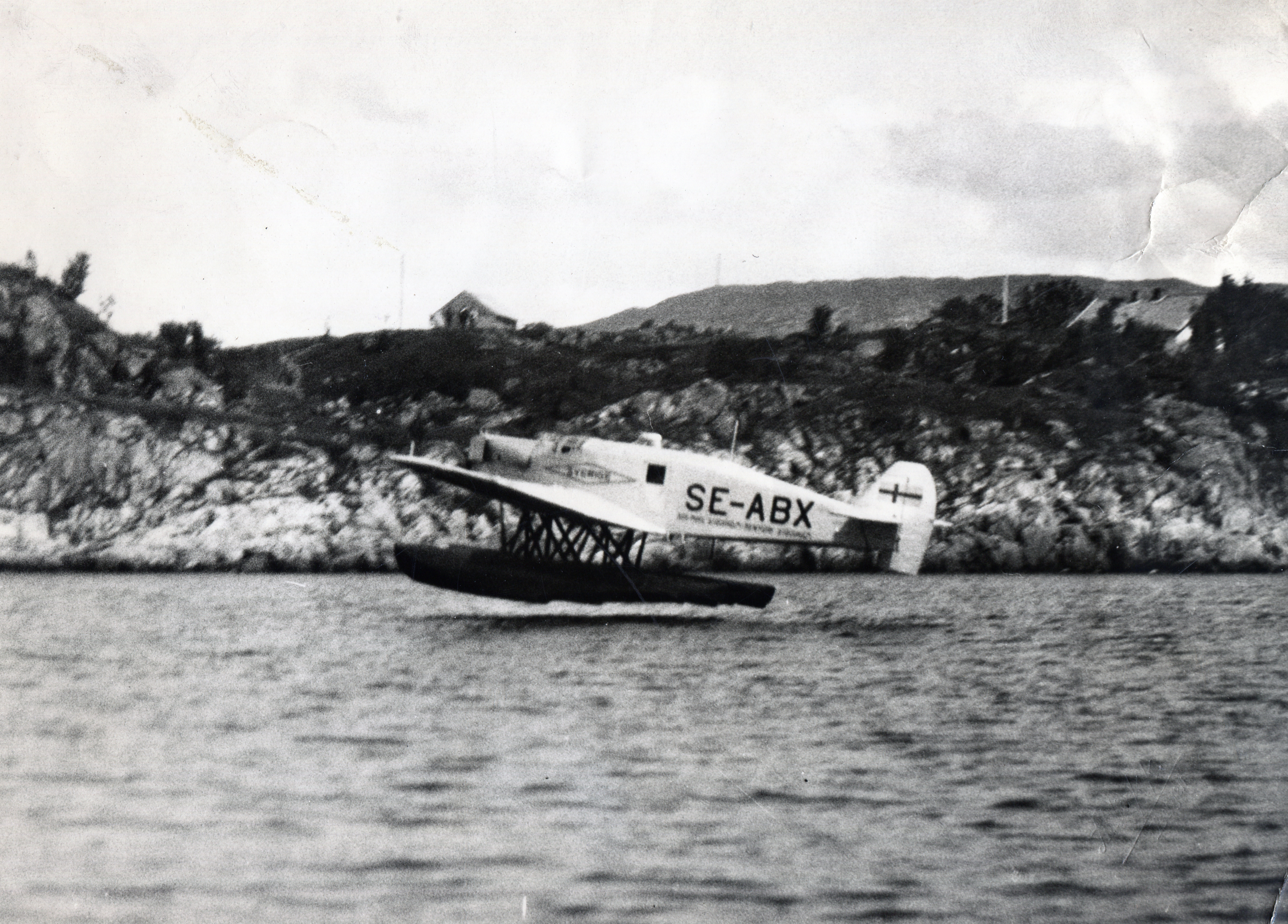 Junkers sjøfly på rundtur for Vaccuum Oil Co. New York lander på Kjeller